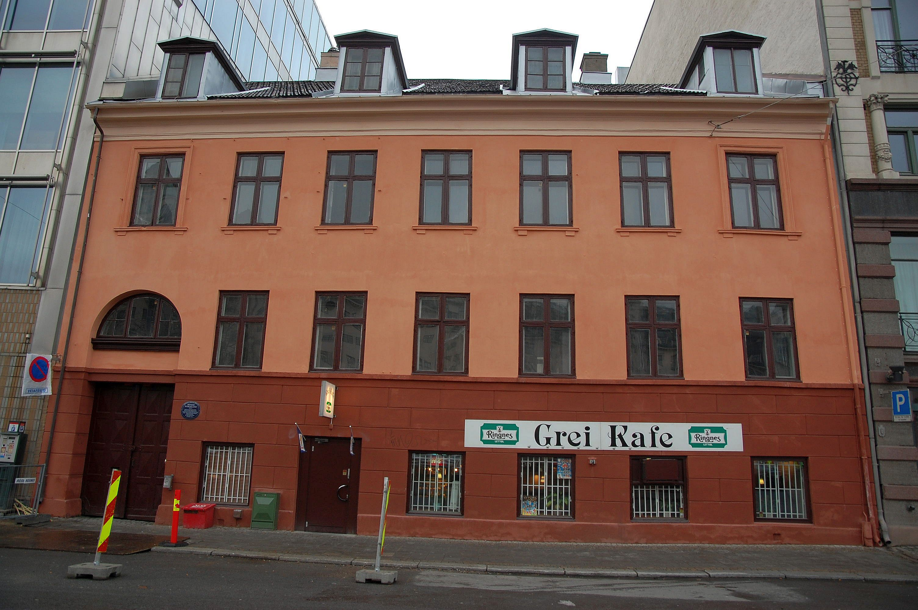 Grei Kafé i Skippergata 3 i Oslo. Bygning oppført i 1837 i empire-stil.